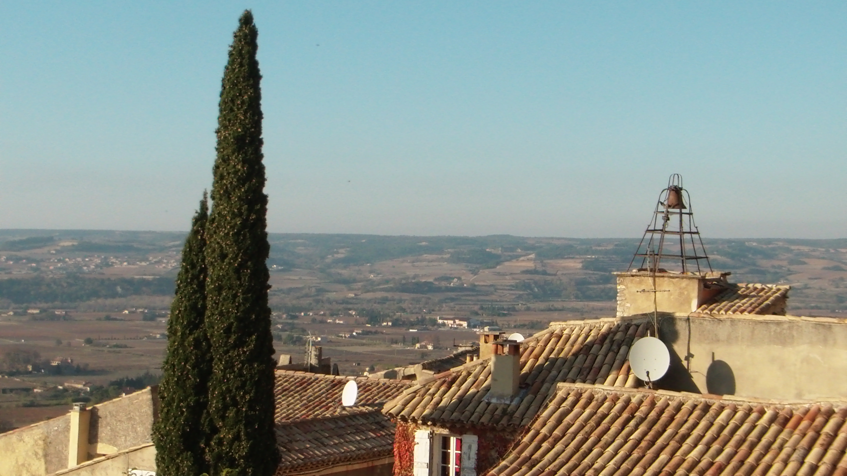 Vue sur la plaine du haut de Séguret et sur la cloche du beffroi.